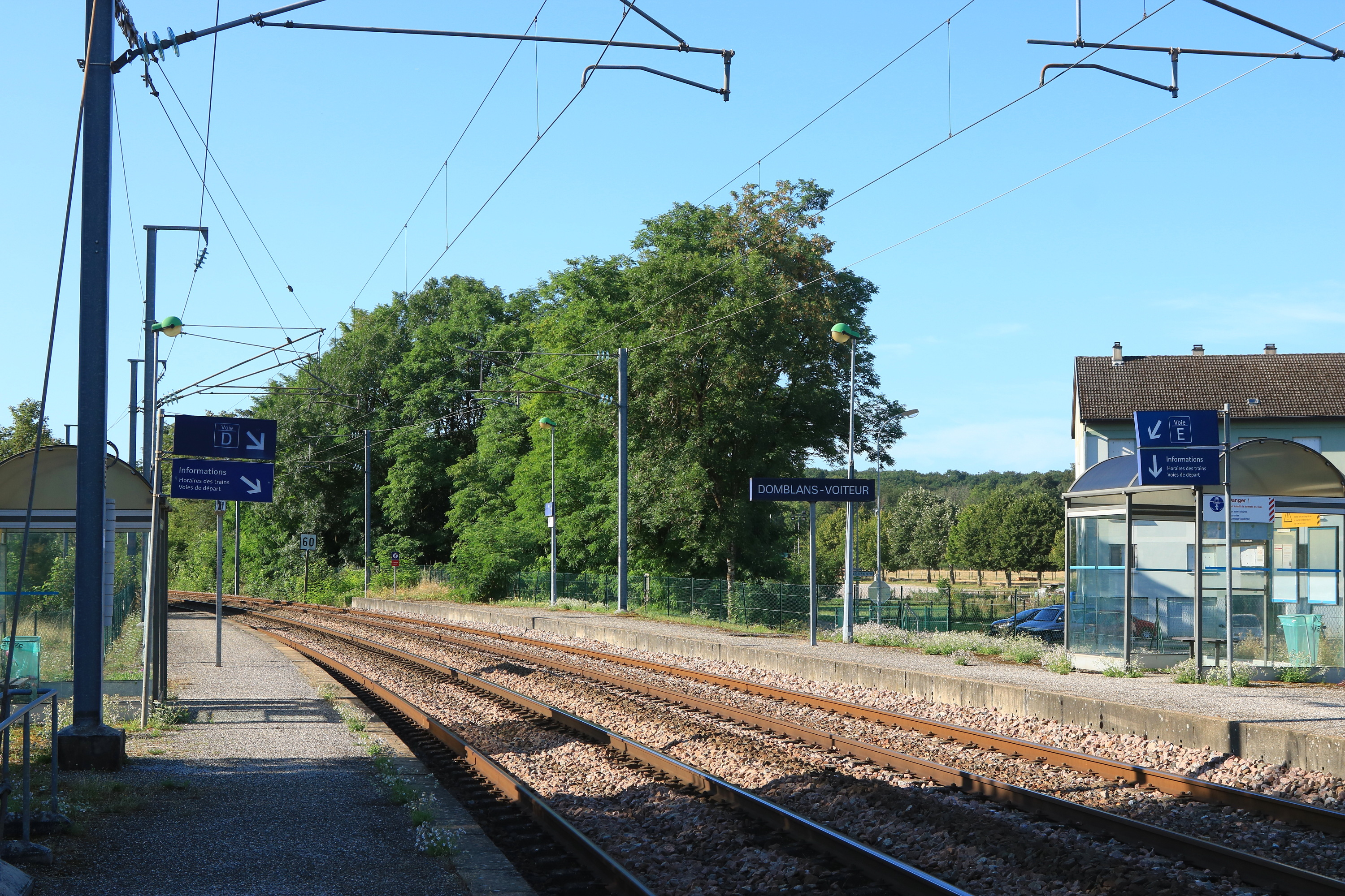 voies de la gare de Domblans - Voiteur vues en direction de Bourg-en-Bresse.